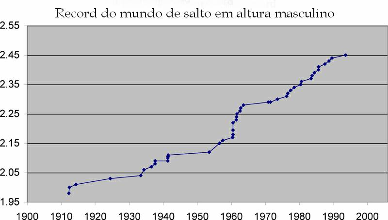 Evolução do record do mundo de salto em altura. Imagem obtida a partir da wikipedia de língua inglesa. Adaptação para a lingua portuguesa de Jose Goncalves